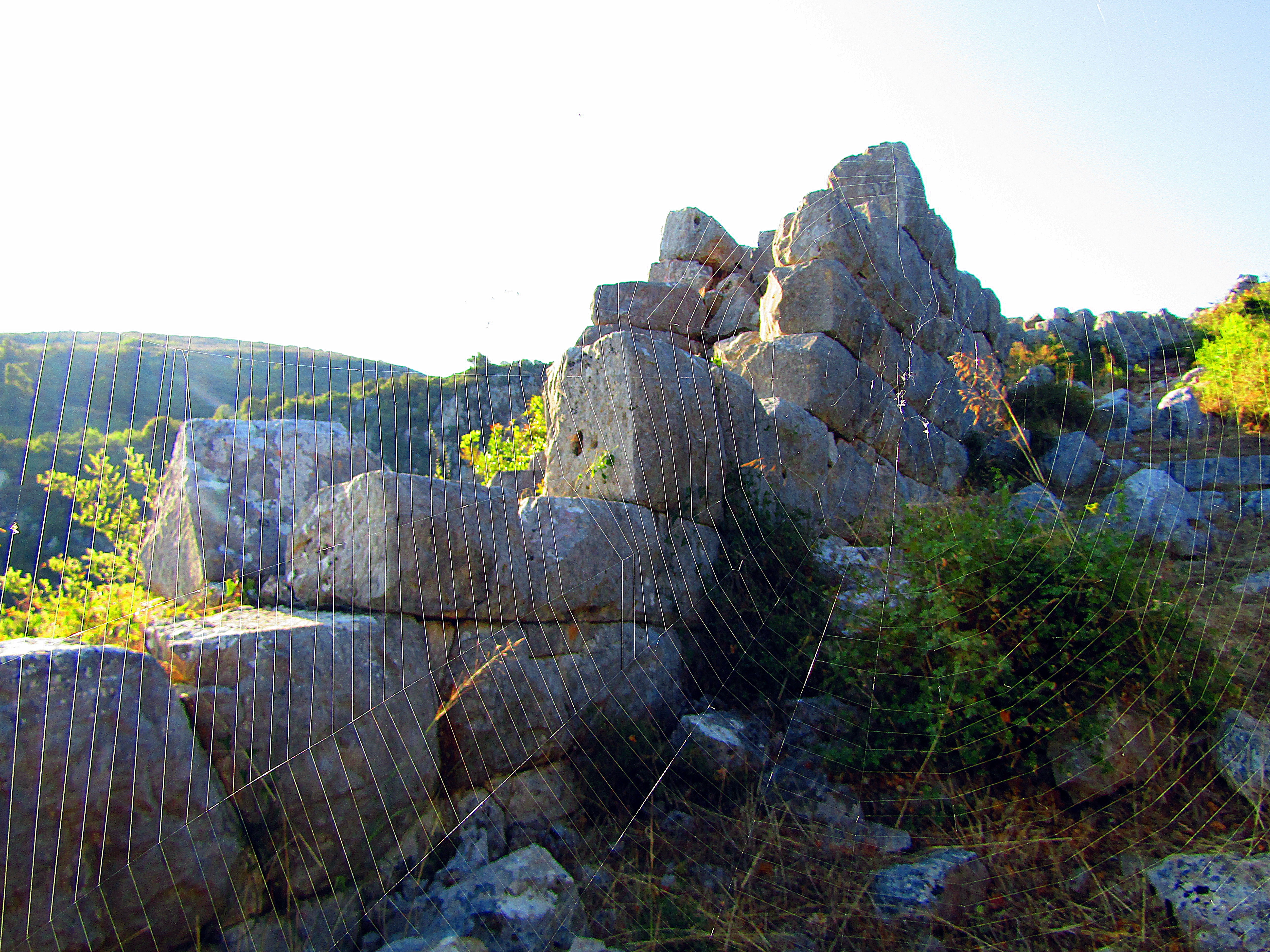 «Κάστρο Χλεμούτσι»